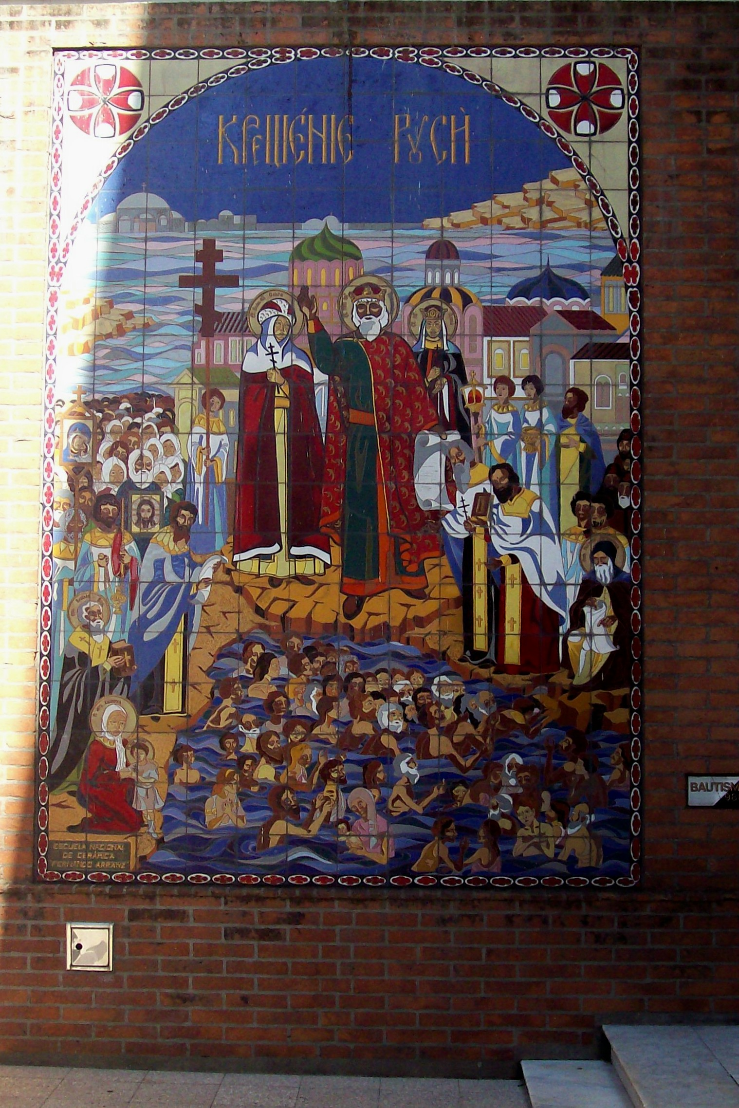 Bautismo de Rusia, 988-1988, ceramica en la Iglesia Ortodoxa Rusa, barrio de San Telmo, Buenos Aires, Argentina. Realizada por la escuela Nacional de Cerámica Fernando Arranz.